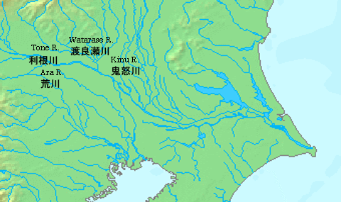 ja::画像:Japan_Kanto_Map_Chikei.gifから作成。